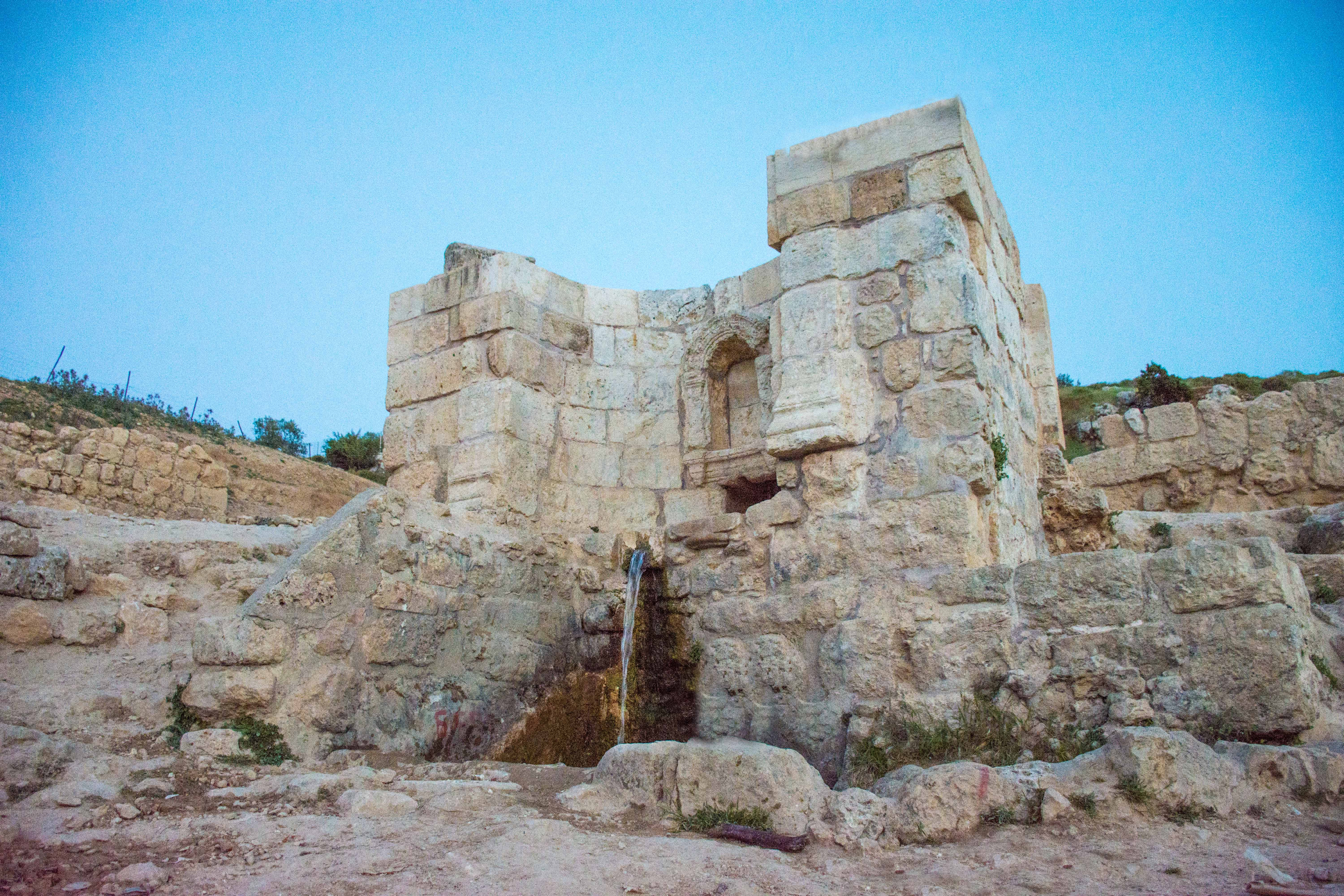 עין חניה